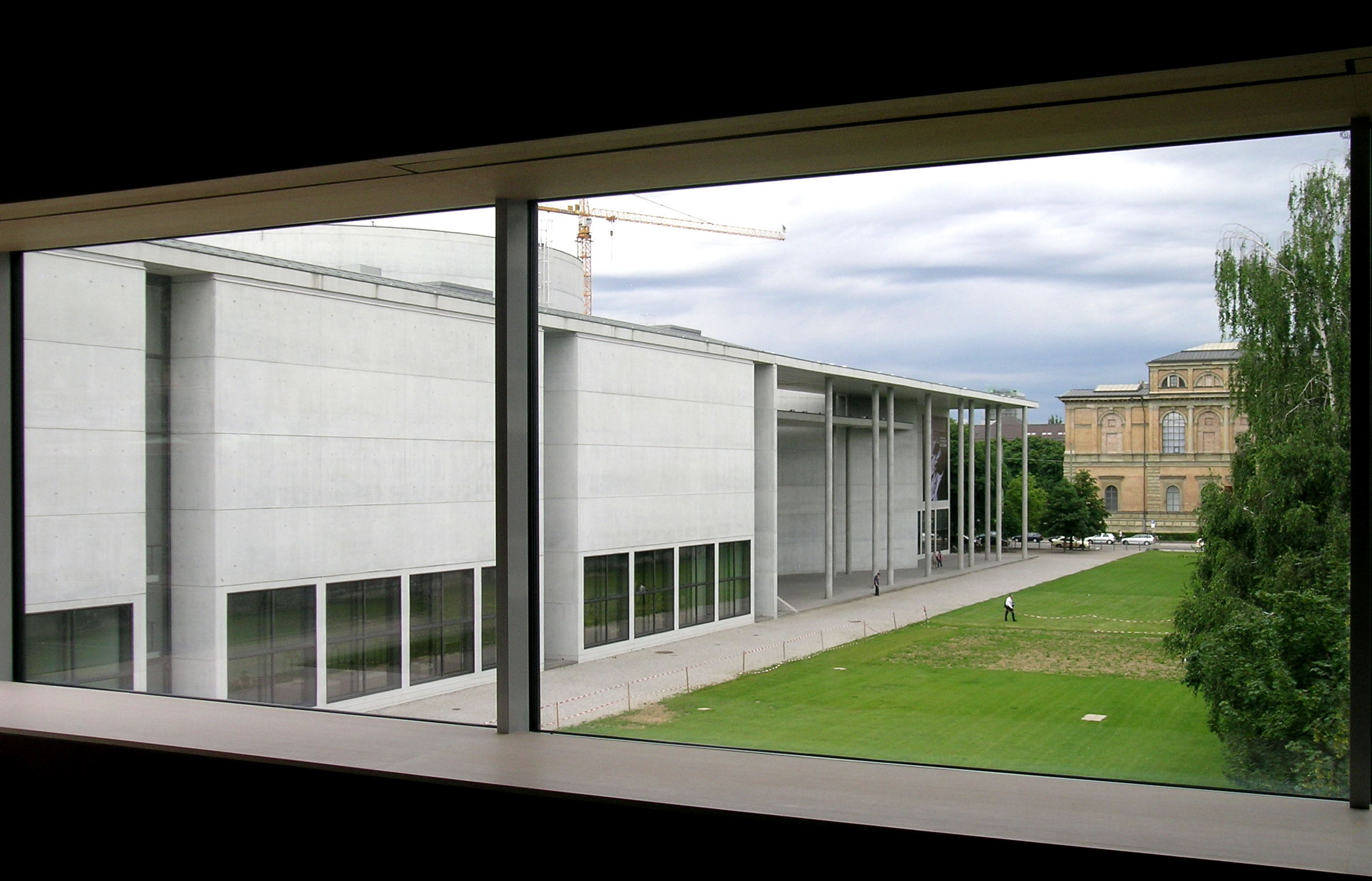 Blick aus dem Ruheraum auf die Pinakoteken